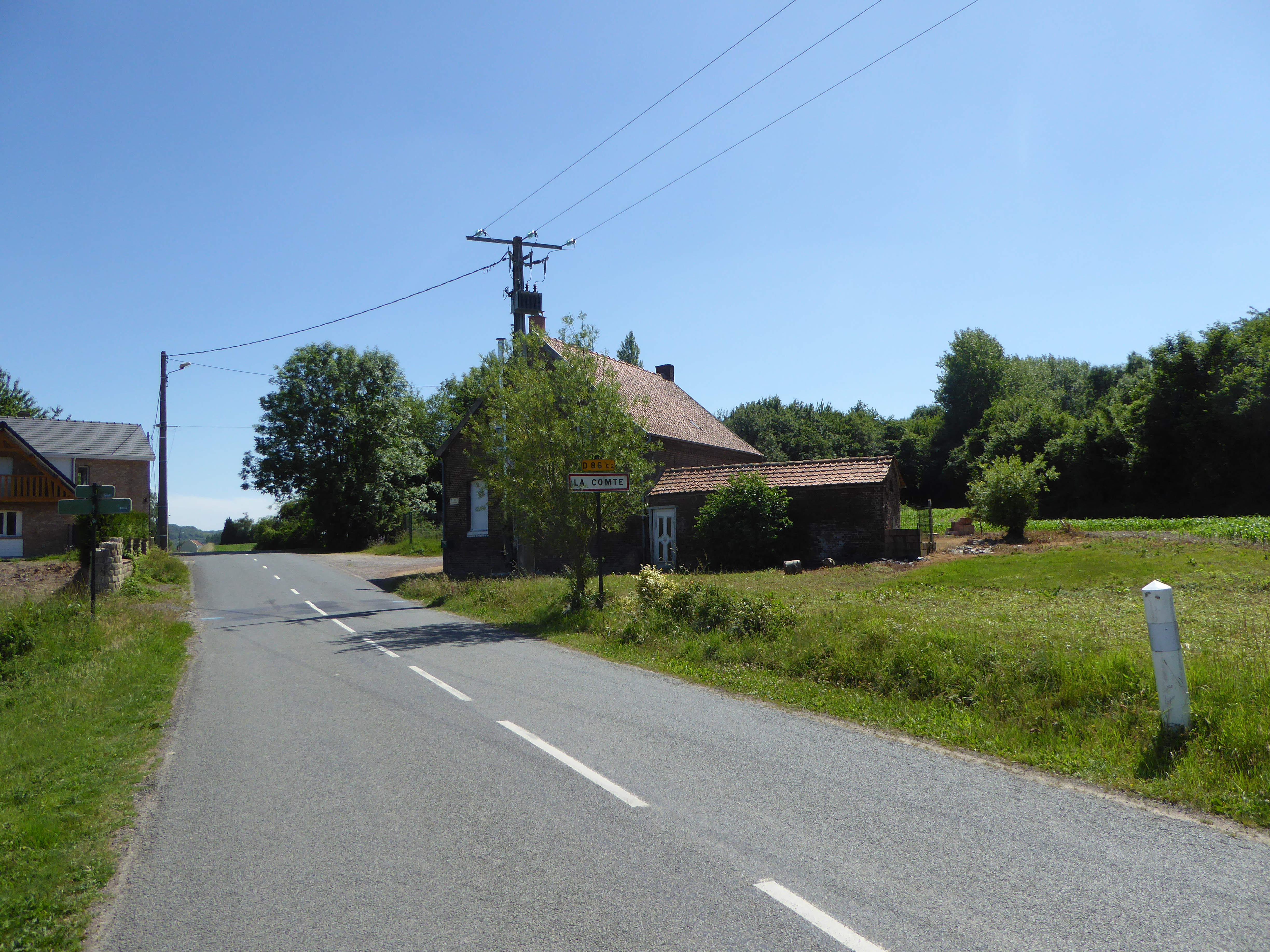 City limit sur la D86 E2 La Comté (Pas-de-Calais, France) .